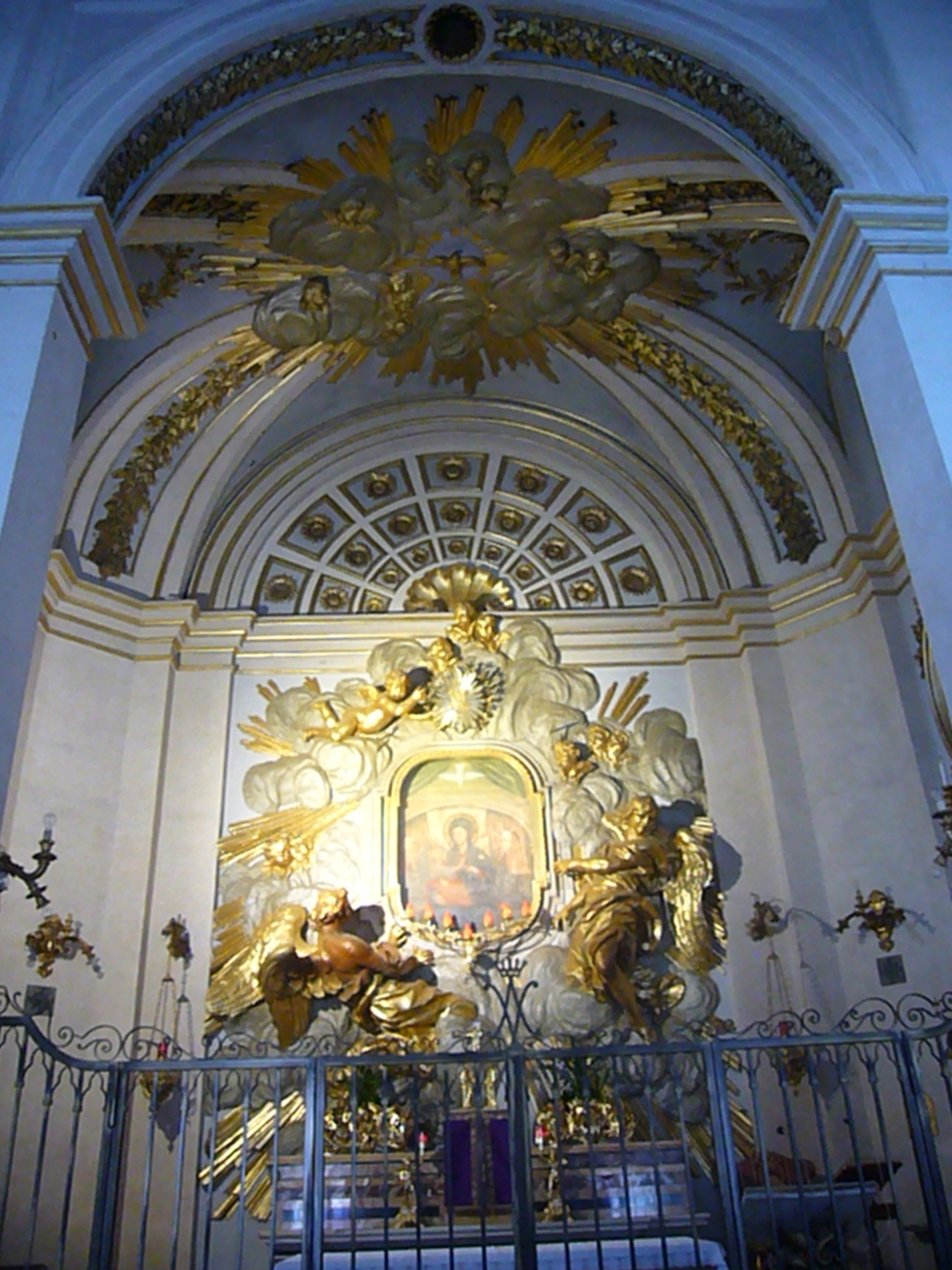 Roma, santuario del Divino Amore. Chiesa antica, altar maggiore